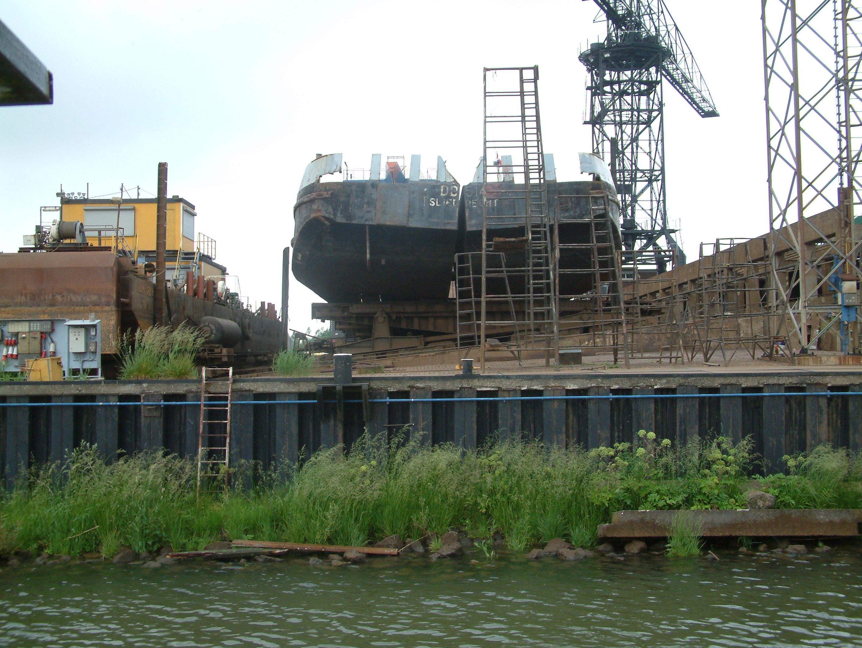 Splijtbak, een baggerbak die over de midden open kan klappen waardoor de geladen bagger weer wordt gestort.